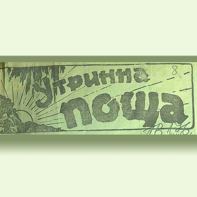 Заглавие на вестник Утринна поща